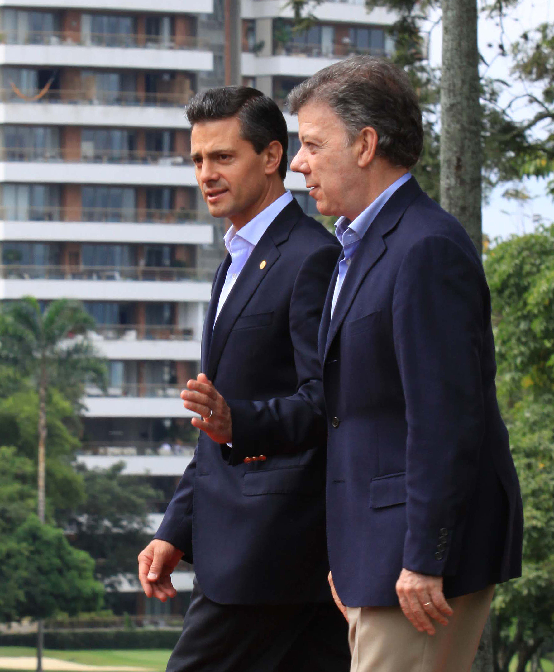 Almuerzo de los Presidentes de los países miembros y observadores. Cali, Colombia.